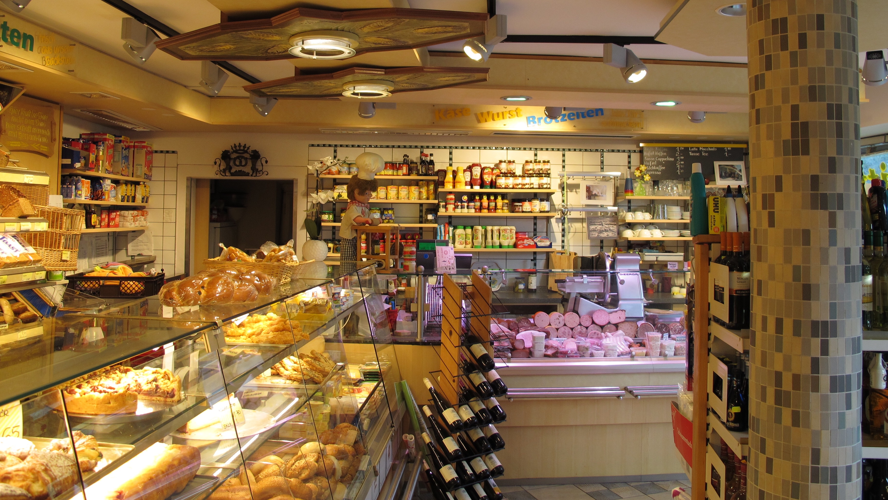 Bäckerei Graf in Ammerland. „Bäckerei Rattlinger“ in der Serie Hubert und Staller.